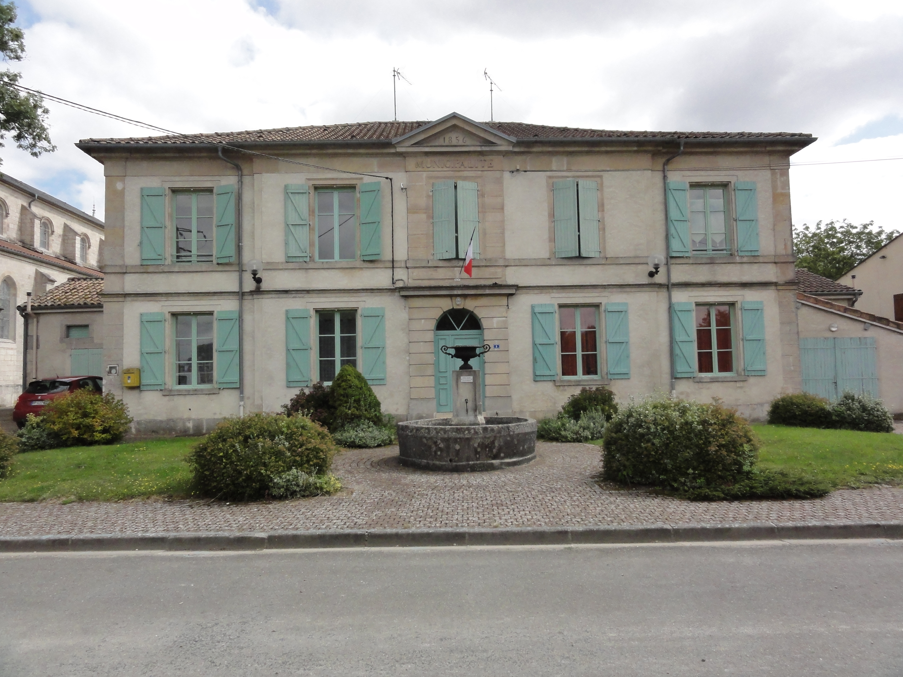 Lavallée (Meuse) mairie